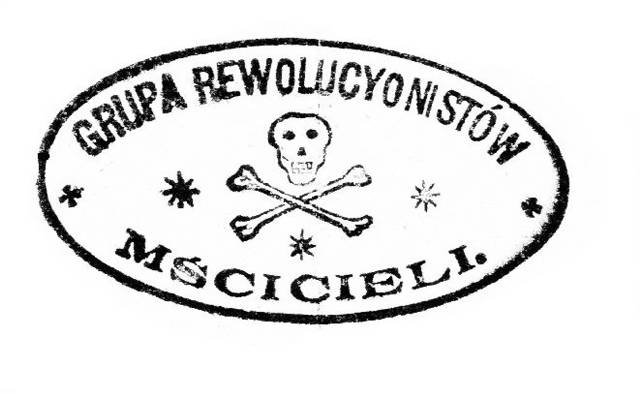 Pieczęć, jaką posługiwali się Rewolucyjni Mściciele